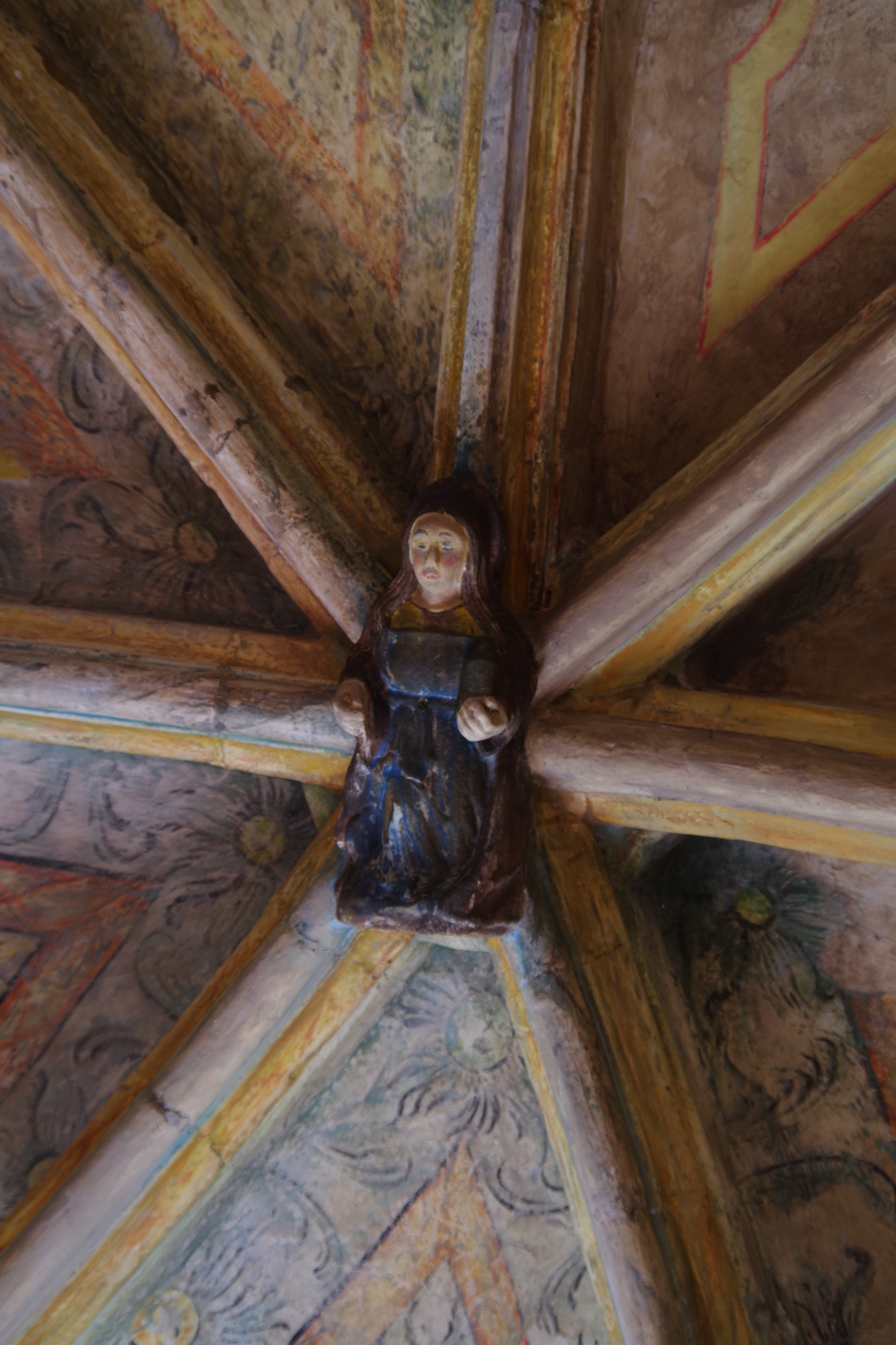 Clé de voute chapelle nord-est